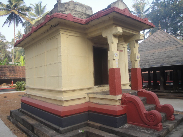 തിരുവാറ്റാ ക്ഷേത്രം-തെക്കുംതേവർ ക്ഷേത്രം